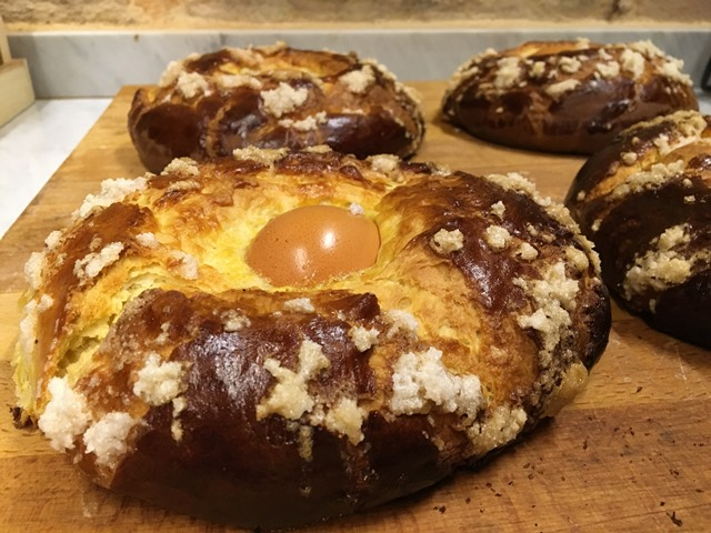 Mona de Pascua elaborada por Maricel Miramontes con Thermomix.